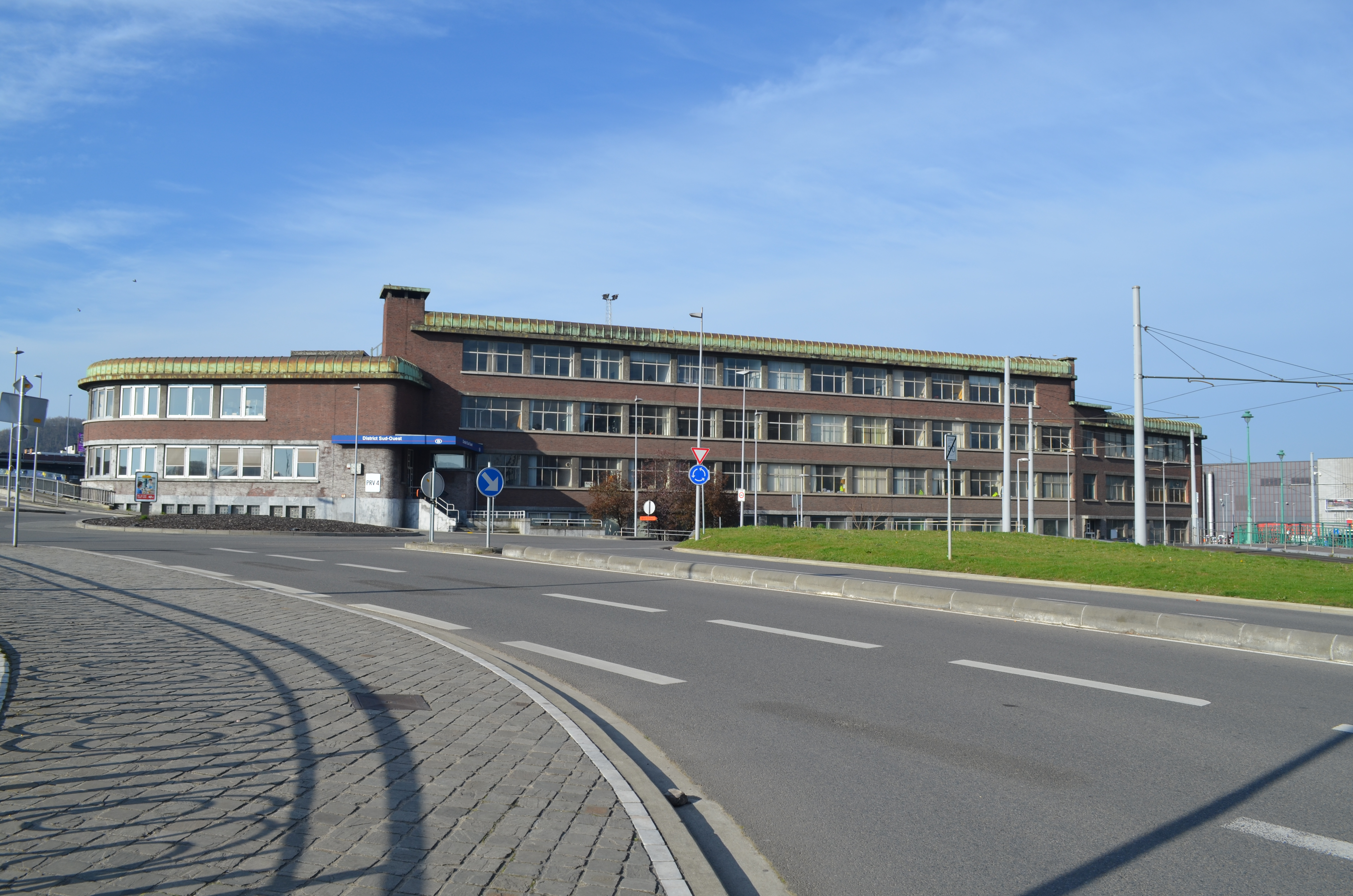 Charleroi - Hôtel des chemins de fer